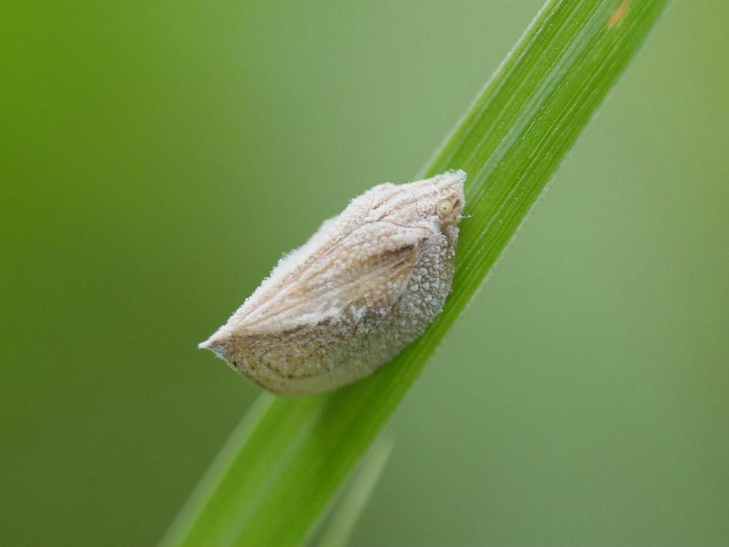 Mimophantia maritima：トビイロハゴロモ 2018/08/11 和歌山県田辺市：Tanabe City. Wakayama Pref. Japan